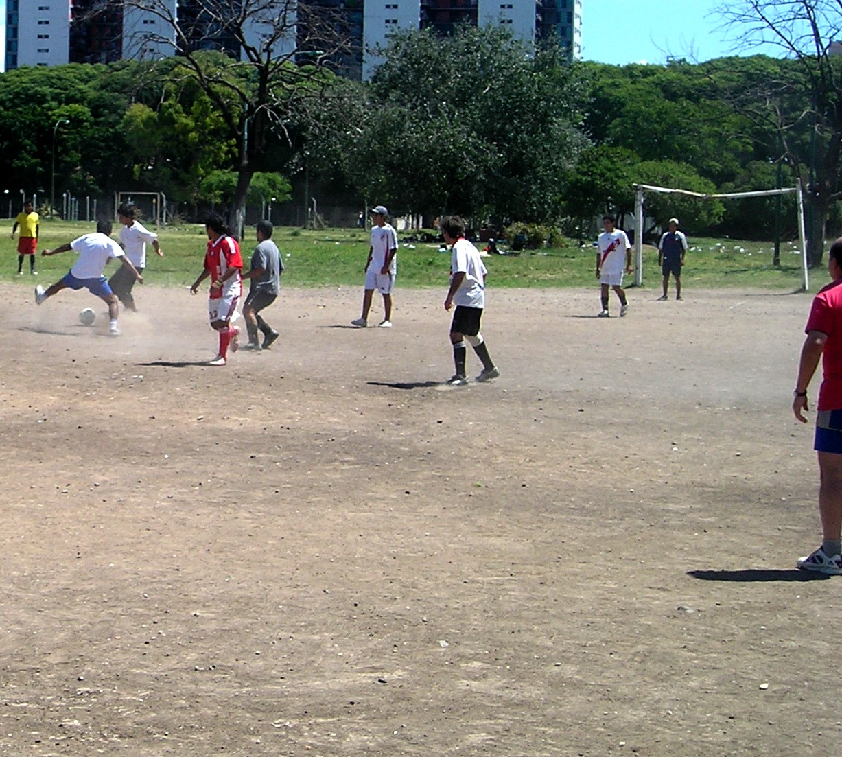 "Fútbol de potrero", Buenos Aires, Argentina.